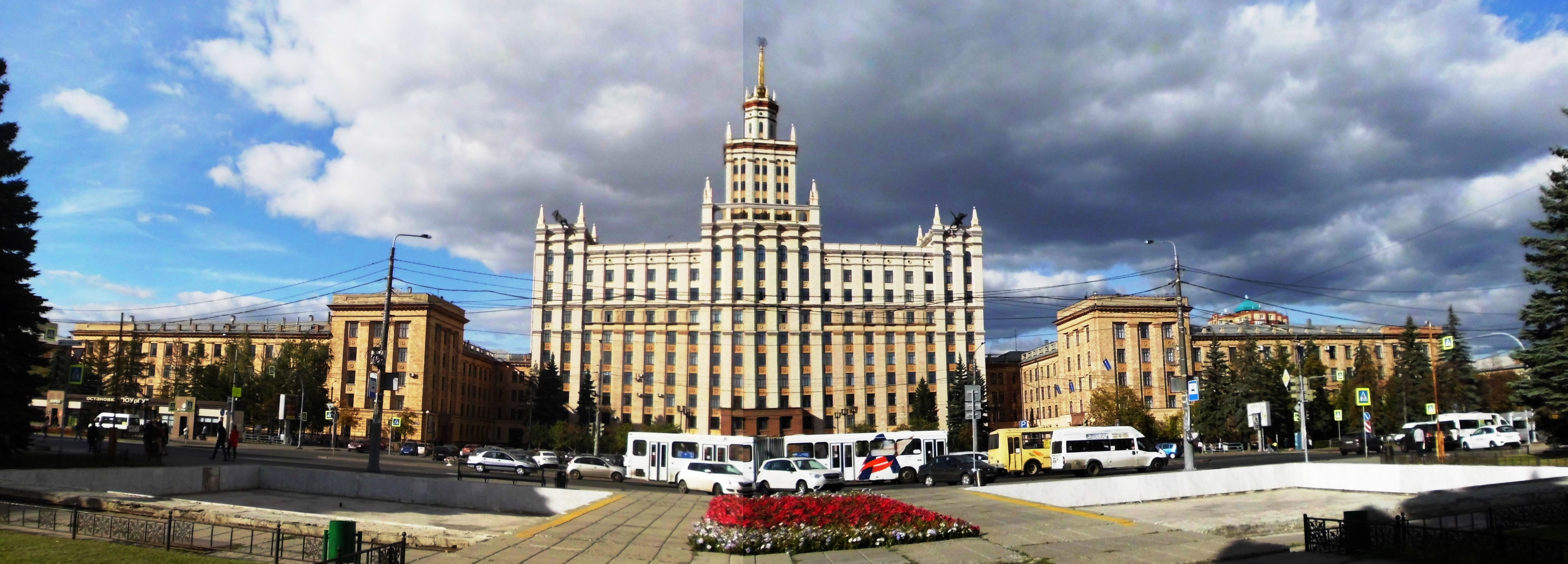 Главный корпус Челябинского государственного технического университета (ЧГТУ, ЧПИ): проспект Ленина, 76 (ЮУрГУ), Челябинск, Челябинская область. Общий вид со стороны проспекта Ленина (сшивка двух фото).